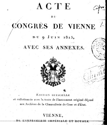 Acte du Congrès de Vienne du 9 juin 1815, avec ses annexes Édition officielle et collationnée avec le texte de l'instrument original déposé aux Archives de la Chancellerie de Cour et d'État Vienne, de l'Imprimerie Impériale et Royale